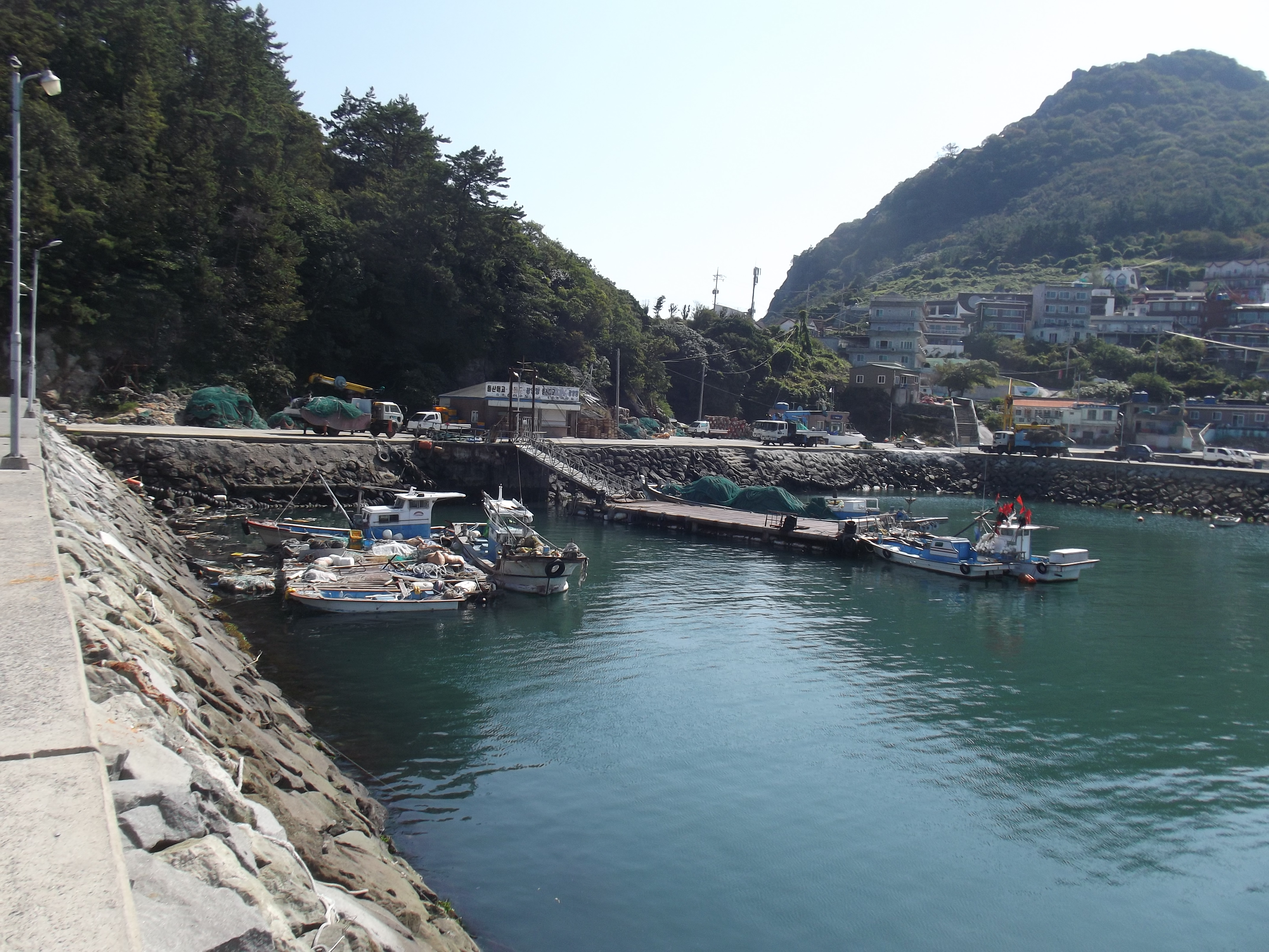 Vissershaven van Yulrim op Dolsando eiland